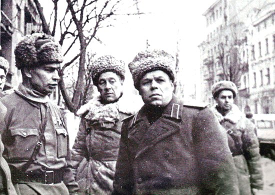 Командующий 3-й танковой армией генерал-лейтенант танковых войск П. С. Рыбалко среди воинов-танкистов. Верхний Дон. Весна 1943 г.